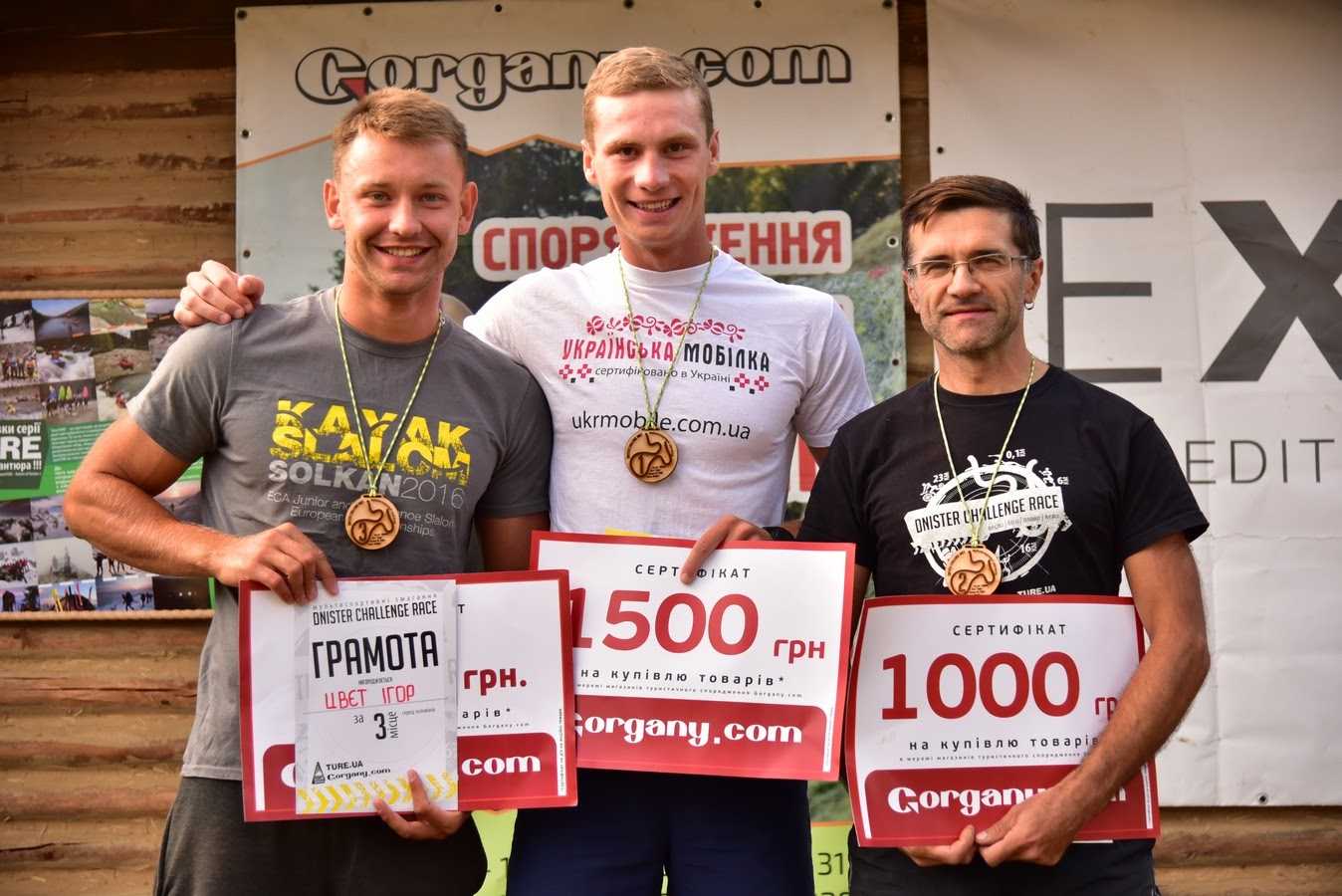 Справа наліво: Сергій Сапіга (ІІ місце), Cіденко Олексій (І місце), Ігор Цвєт (ІІІ місце)